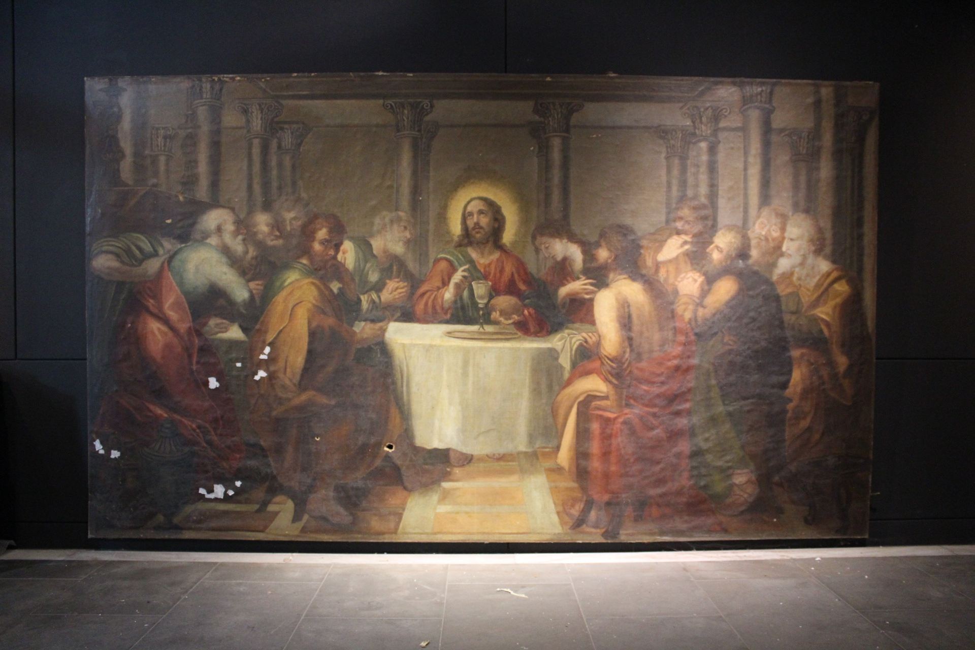 Joan Carles Panyó i Figaró (1755-1840) Sant Sopar MCGO-4263 Oli sobre tela Museus d'Olot